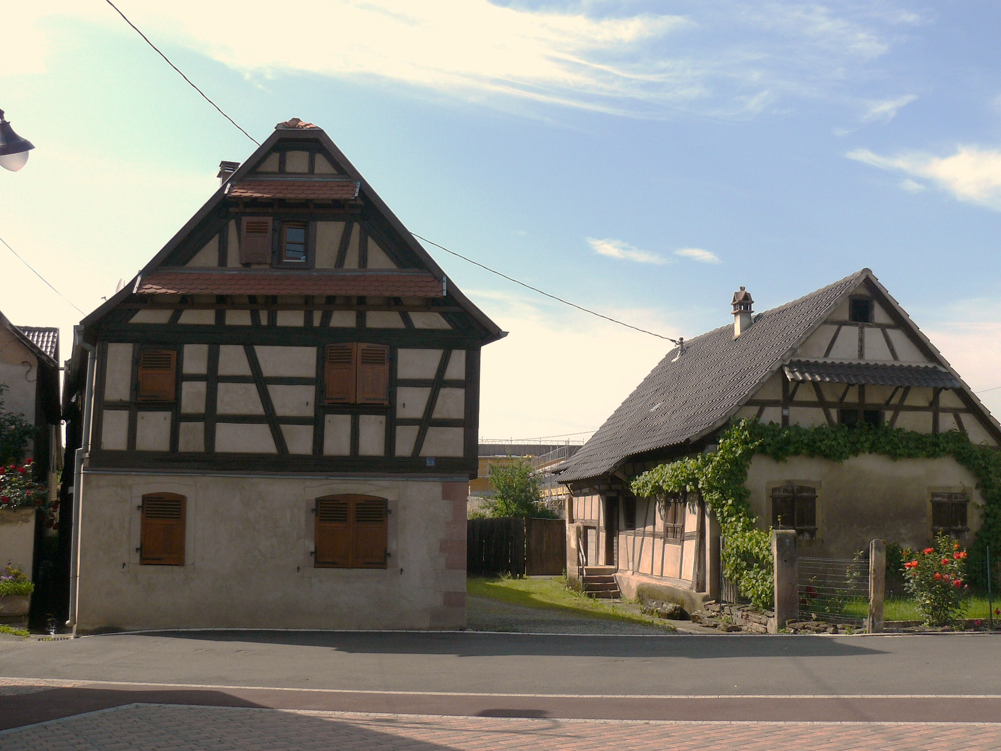 Maisons à colombages